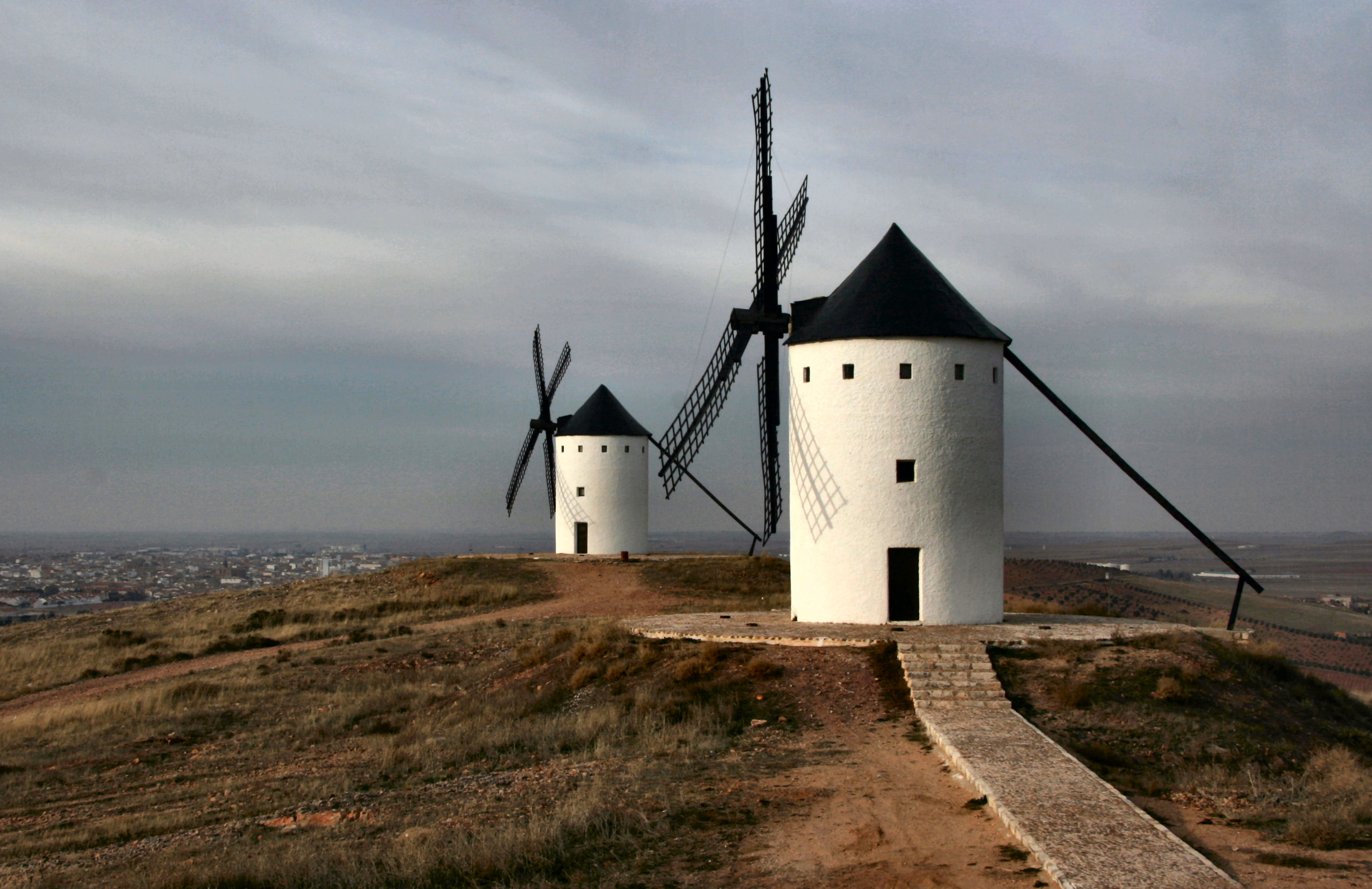 El Cerro de San Antón es el nombre que recibe la elevación donde se encuentran cuatro de molinos de viento que conserva la ciudad de Alcázar de San Juan.